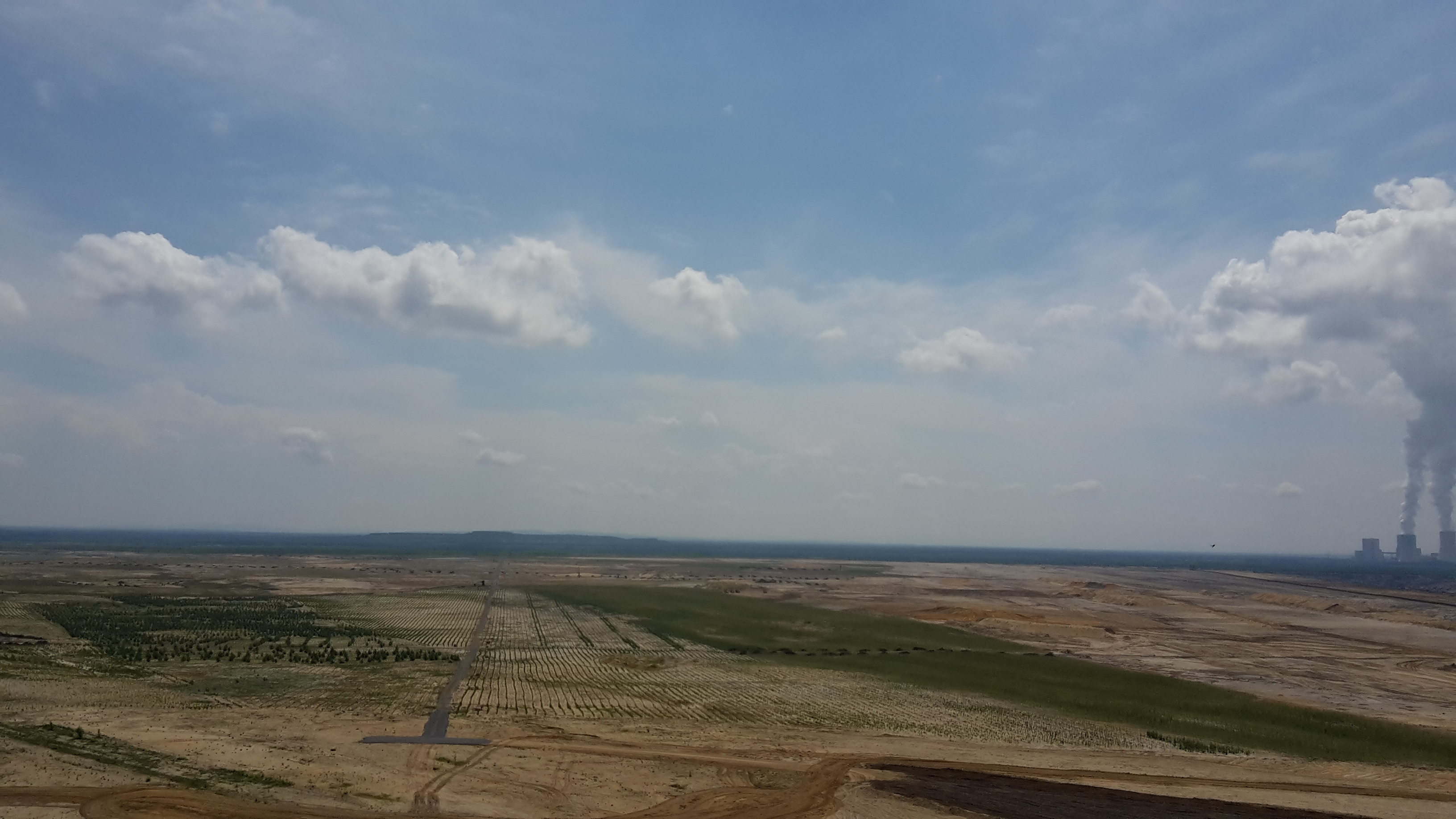 Abgebaggerte Muskauer Heide südl Weißwasser 2016, Tagebau Nochten, Blick vom Turm "Schwerer Berg" nach Süden